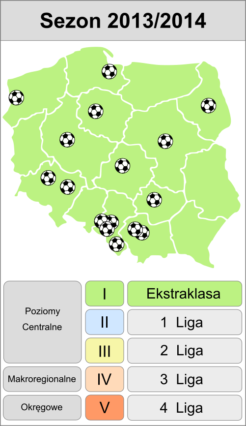 Jagiellonia w sezonie 2014/2015 - mapa